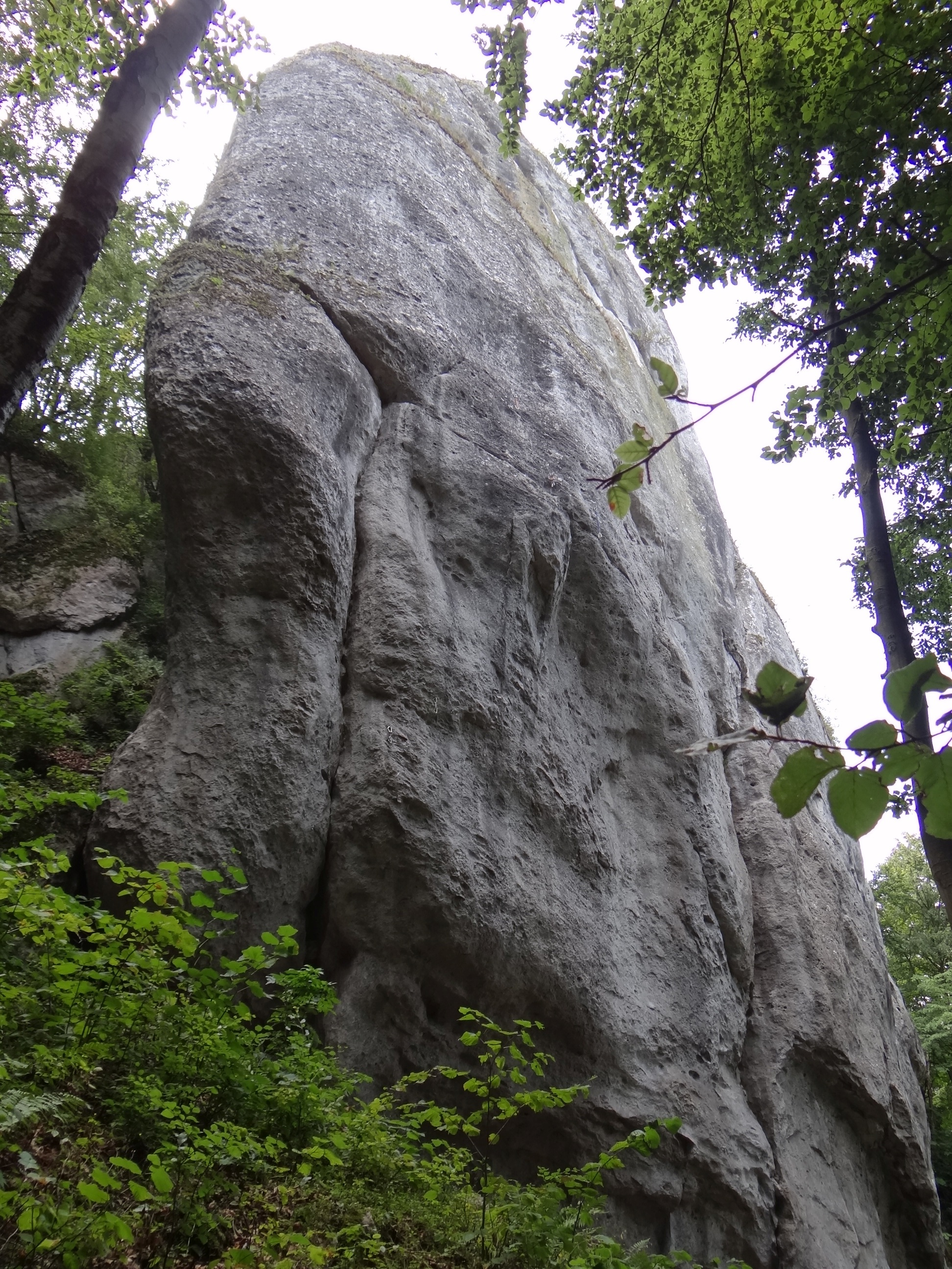 Skały Jastrzębnik na wzgórzu Jastrzębnik na Wyżynie Częstochowskiej